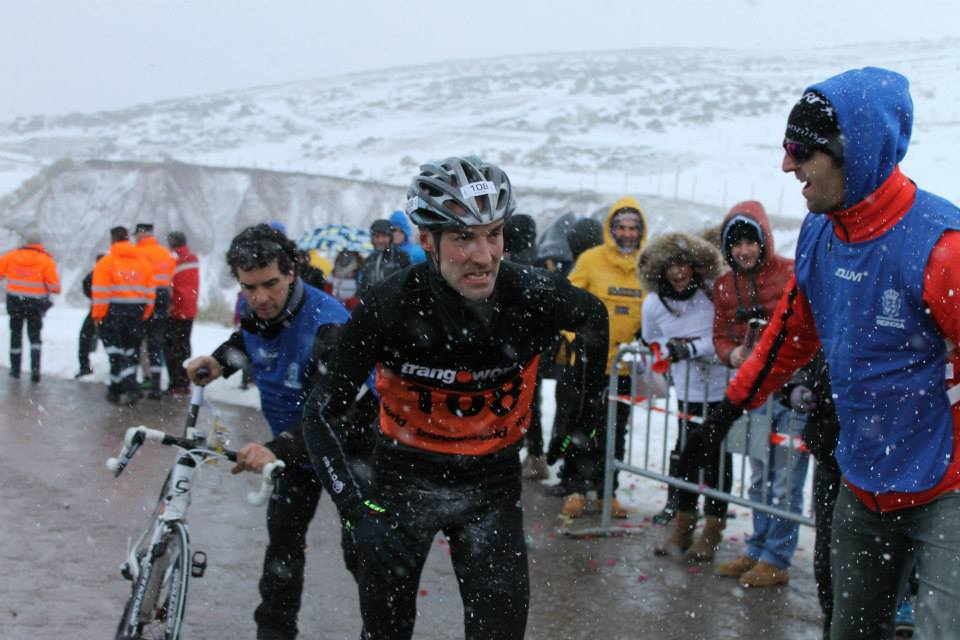 Triatleta afronta la última transición tras dejar la bicicleta.